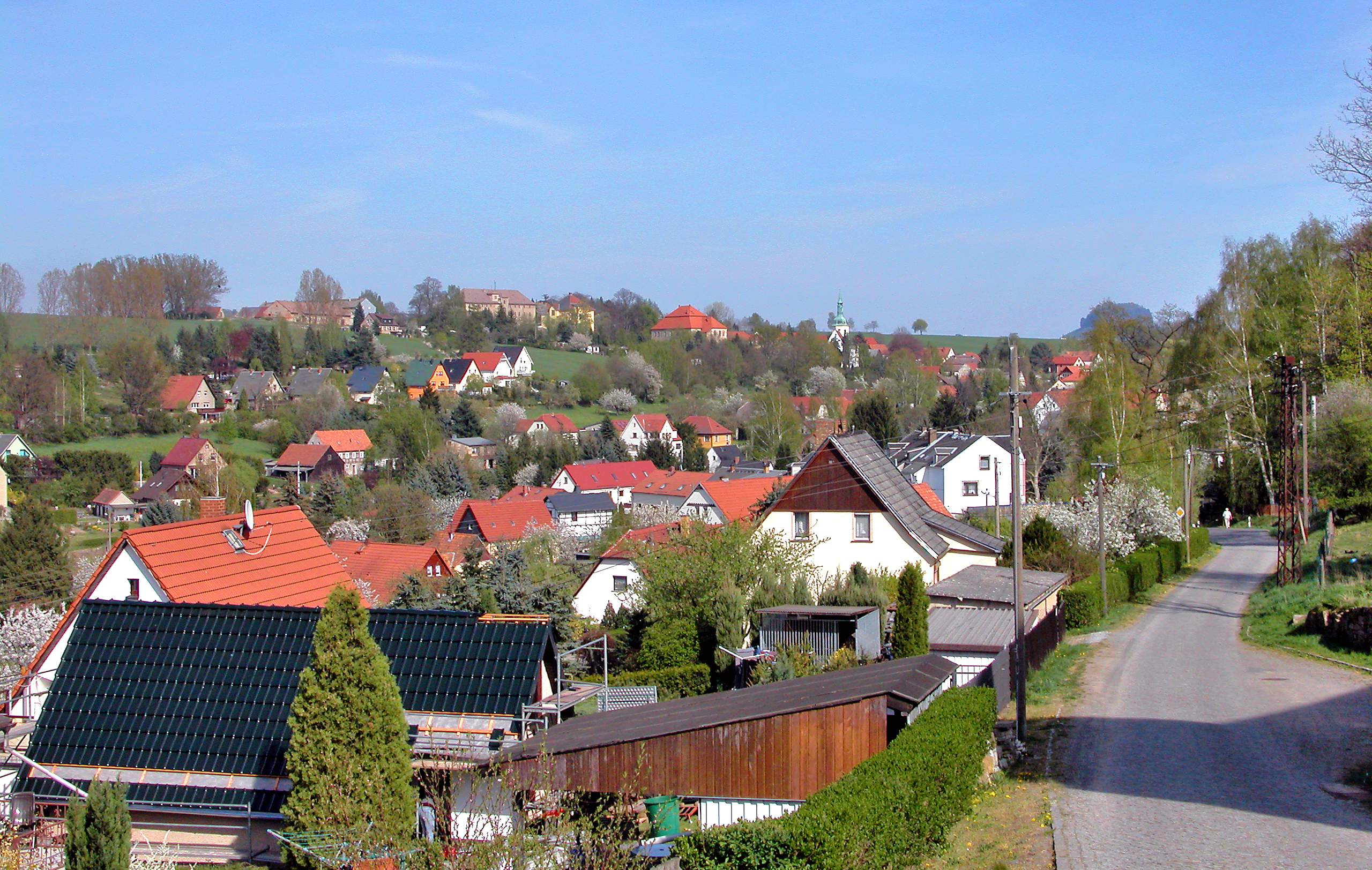 21.04.2007 01796 Struppen: Blick von Neustruppen nach Kleinstruppen mit Rittergut, Kadettenanstalt, Schule, Schloß und Kirche. [DSCN22068.TIF]20070421300.JPG(c)Blobelt